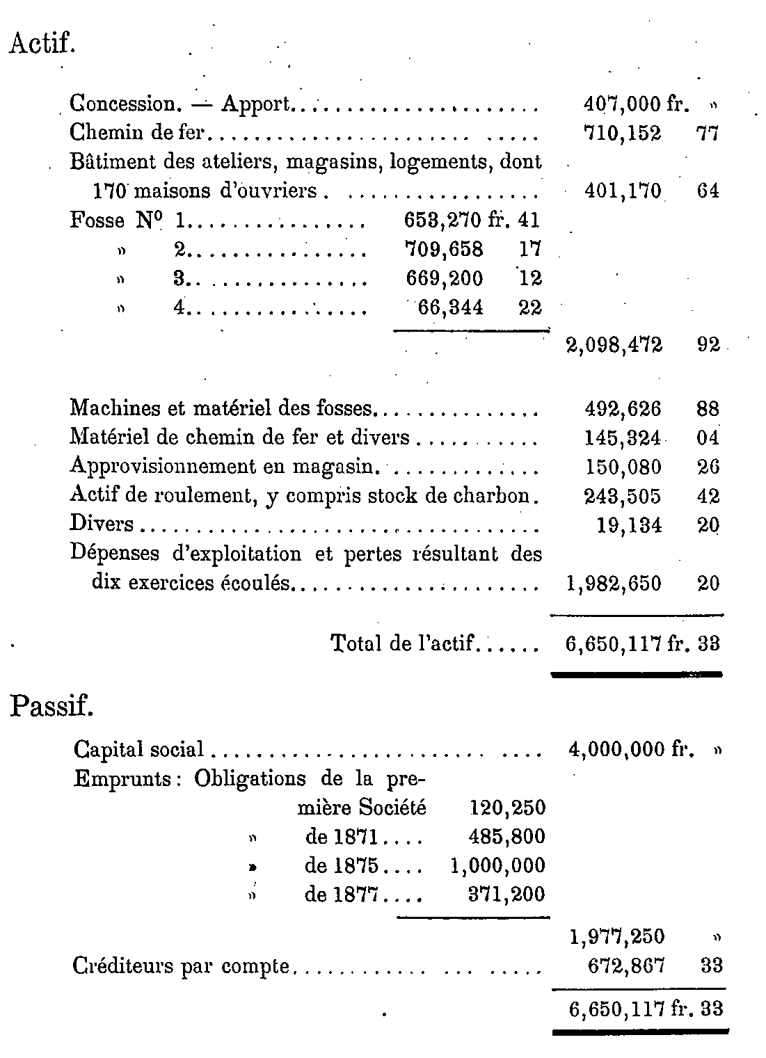 Bilan au 31 décembre 1877 de la Compagnie des mines d'Auchy-au-Bois.